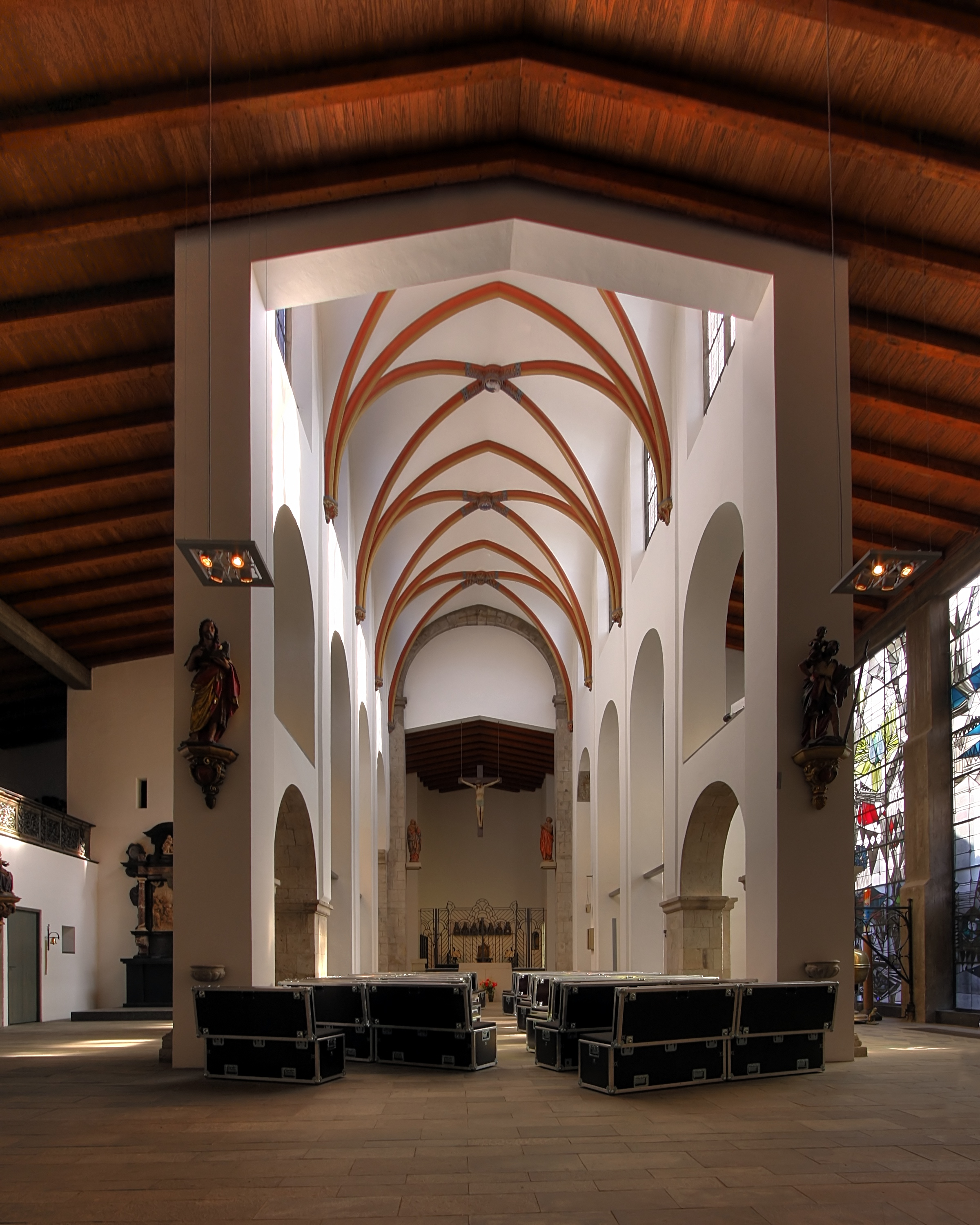 Innenraum der denkmalgeschützten Kirche St. Johann Baptist, Köln